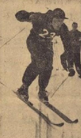 Luboš Brchel (1920-1981), československý lyžař